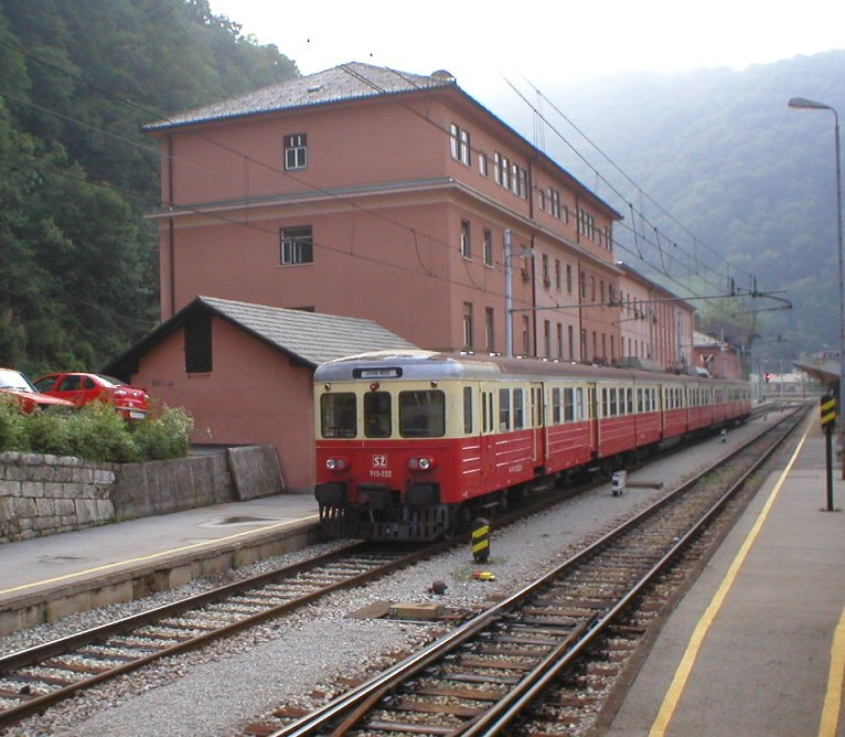 315 series train in Zidani Most, Slovenia self-made